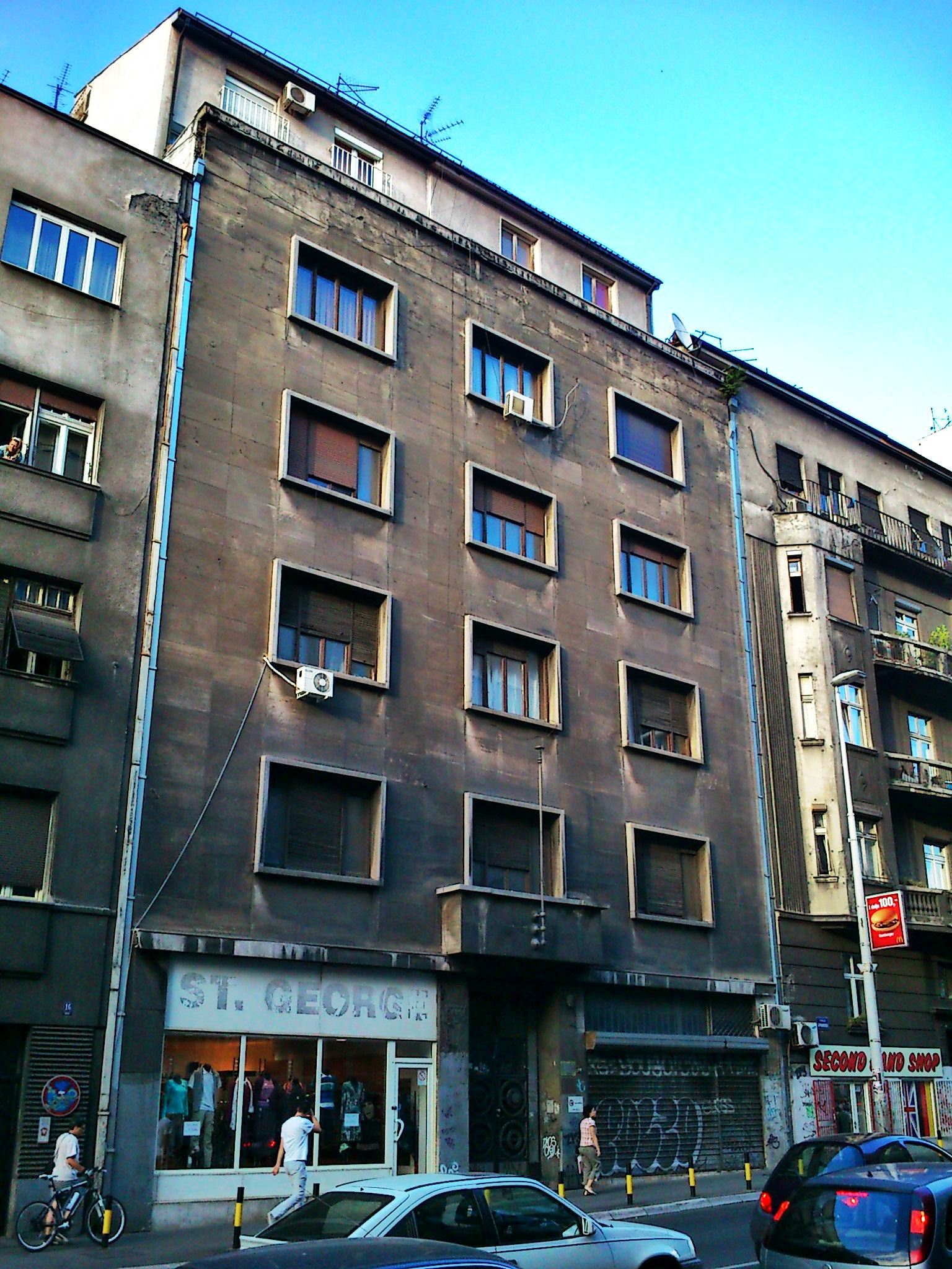 Зграда Јосифа Шојата